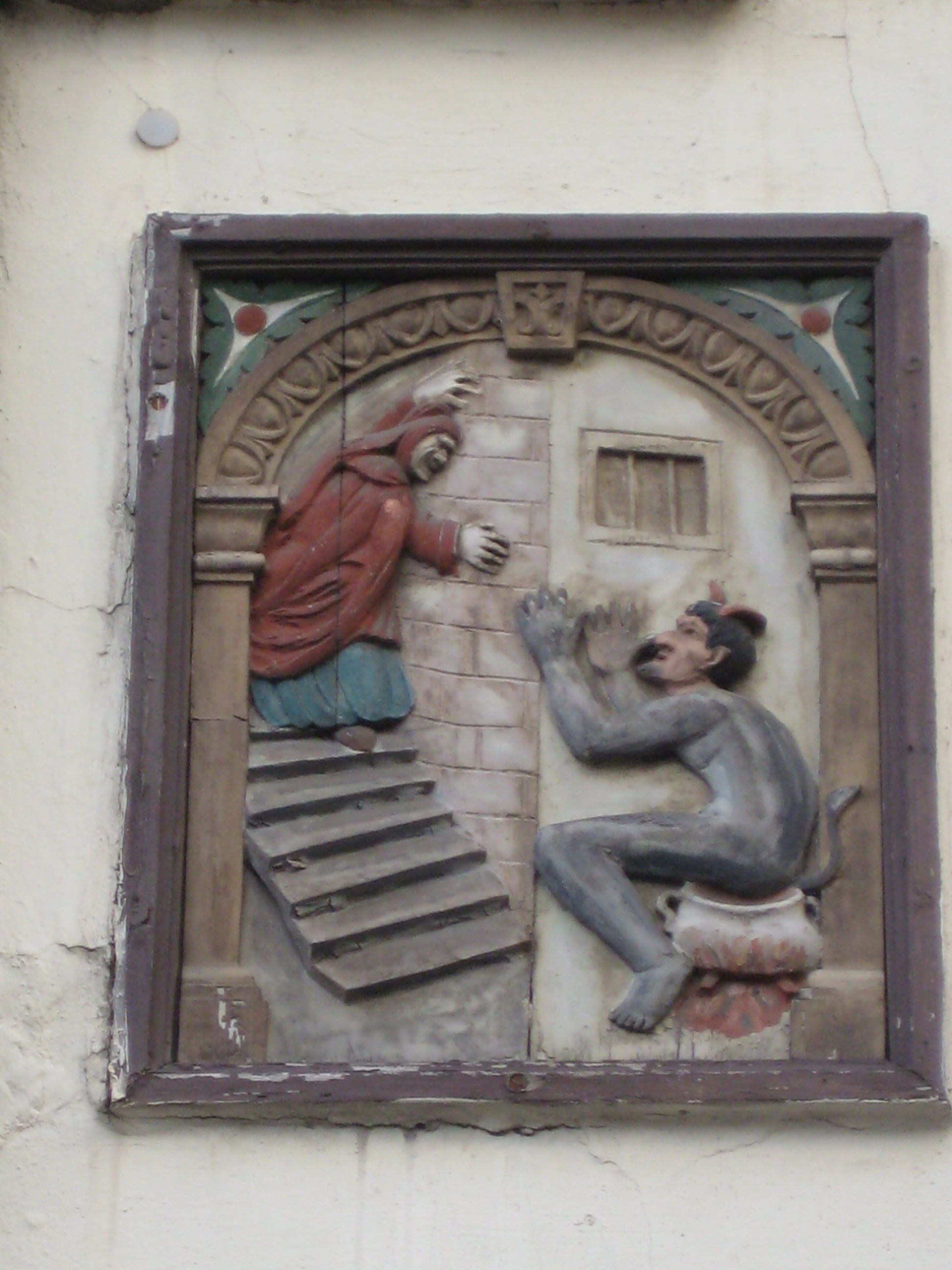 Unbekannter Künstler: „Großmutter und Teufel“, Sandsteinrelief am Hotel Walhalla in Osnabrück, nach dem Original aus dem 16. oder 17. Jahrhundert